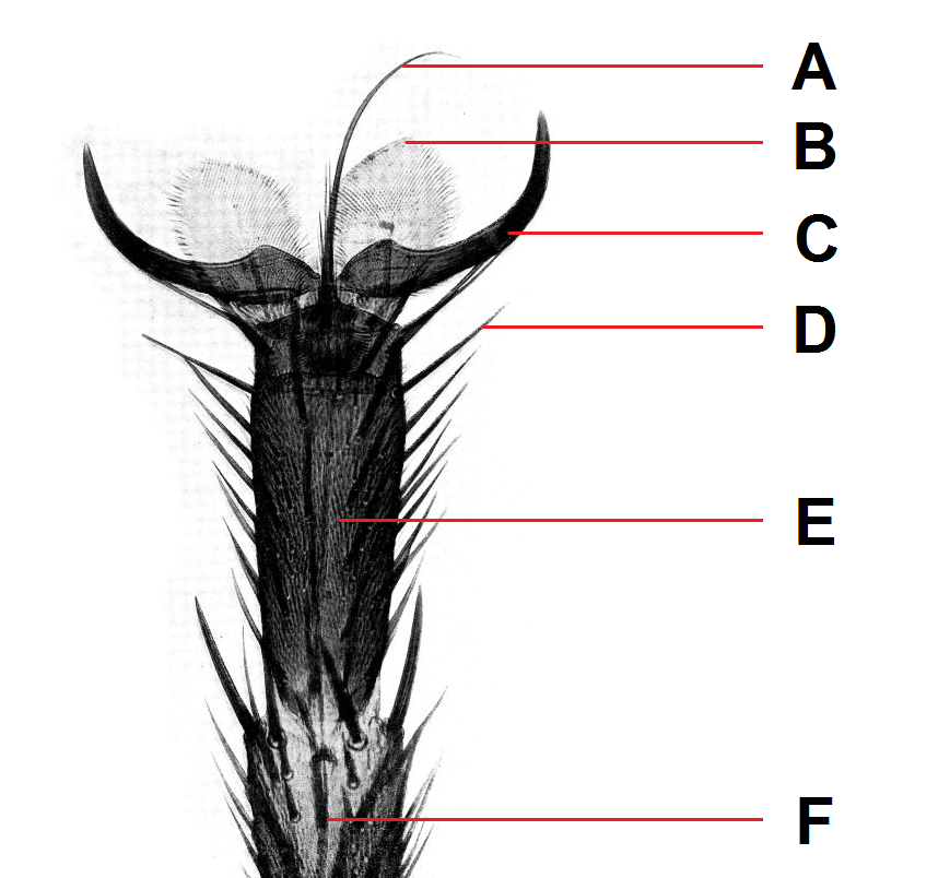 Bron: de Wonderen van het Heelal Leiden, 1930, Sijthoff